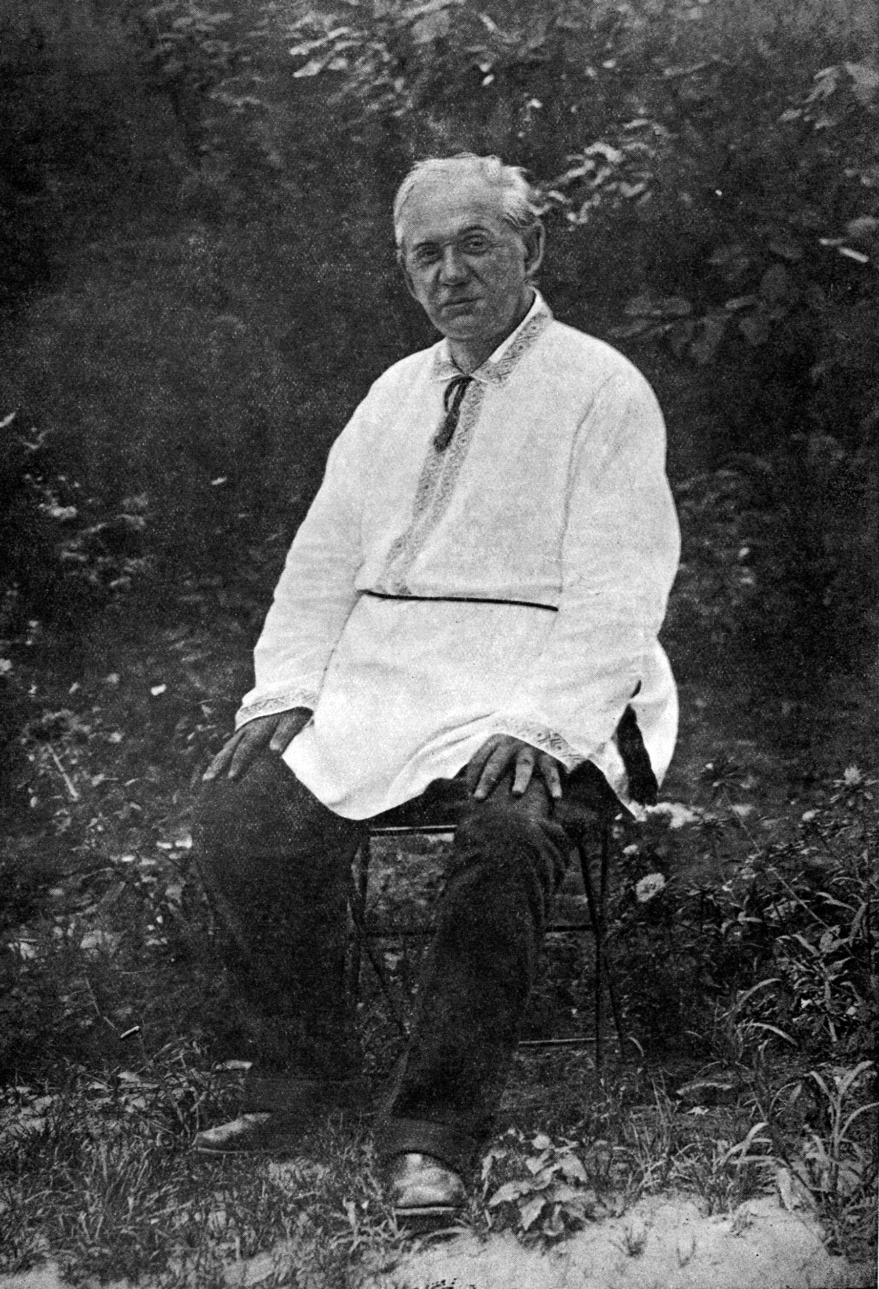 Академик Д. А. Граве, Киев, 1936 год